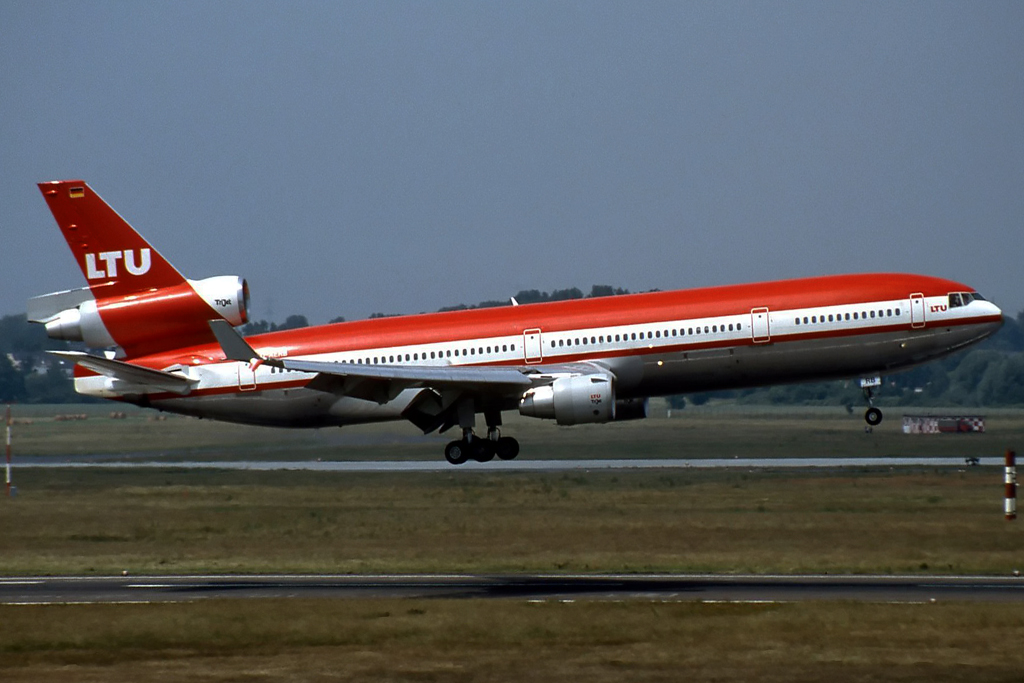 D-AERB MD11 LTU